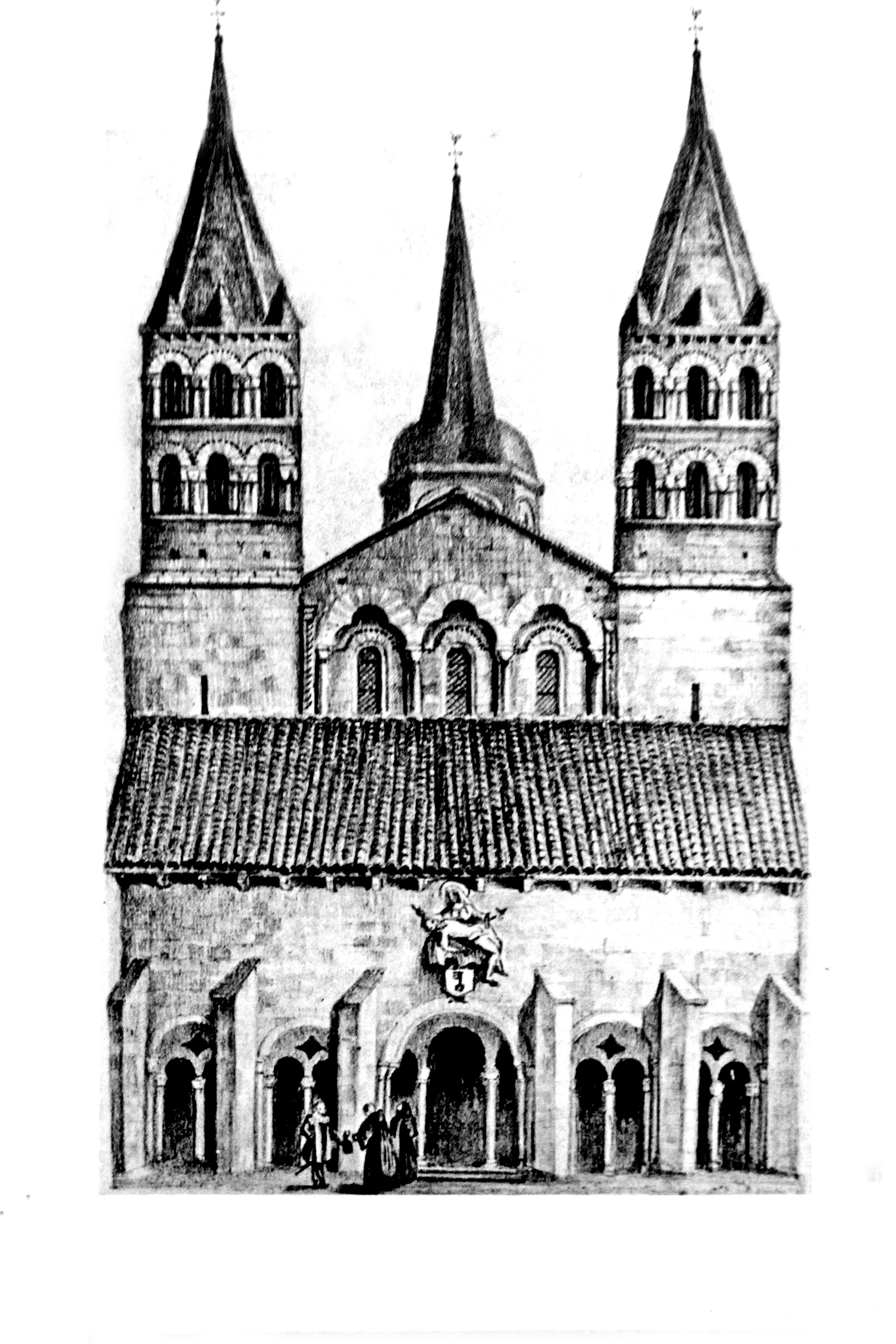 Saint-Etienne Nevers, Fassade vor 1792, alte Grafik